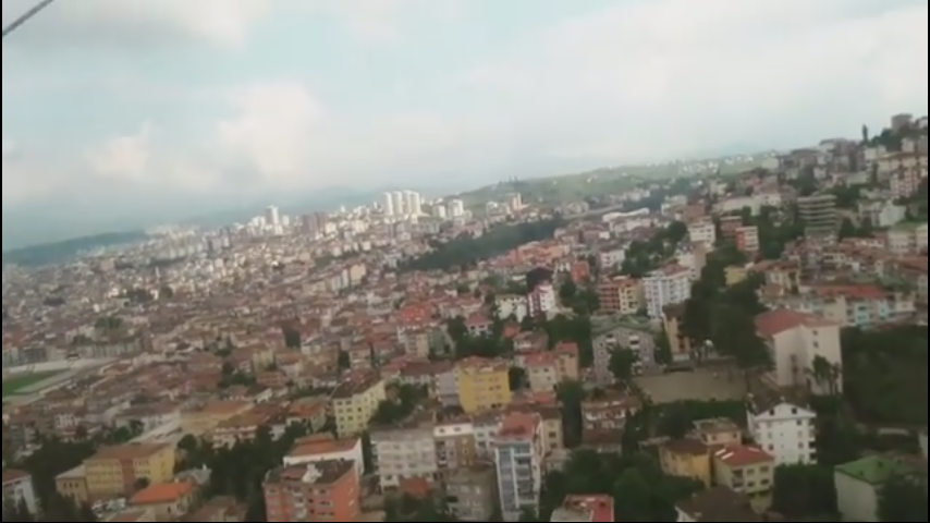 Teleferikten Ordu'nun manzarası